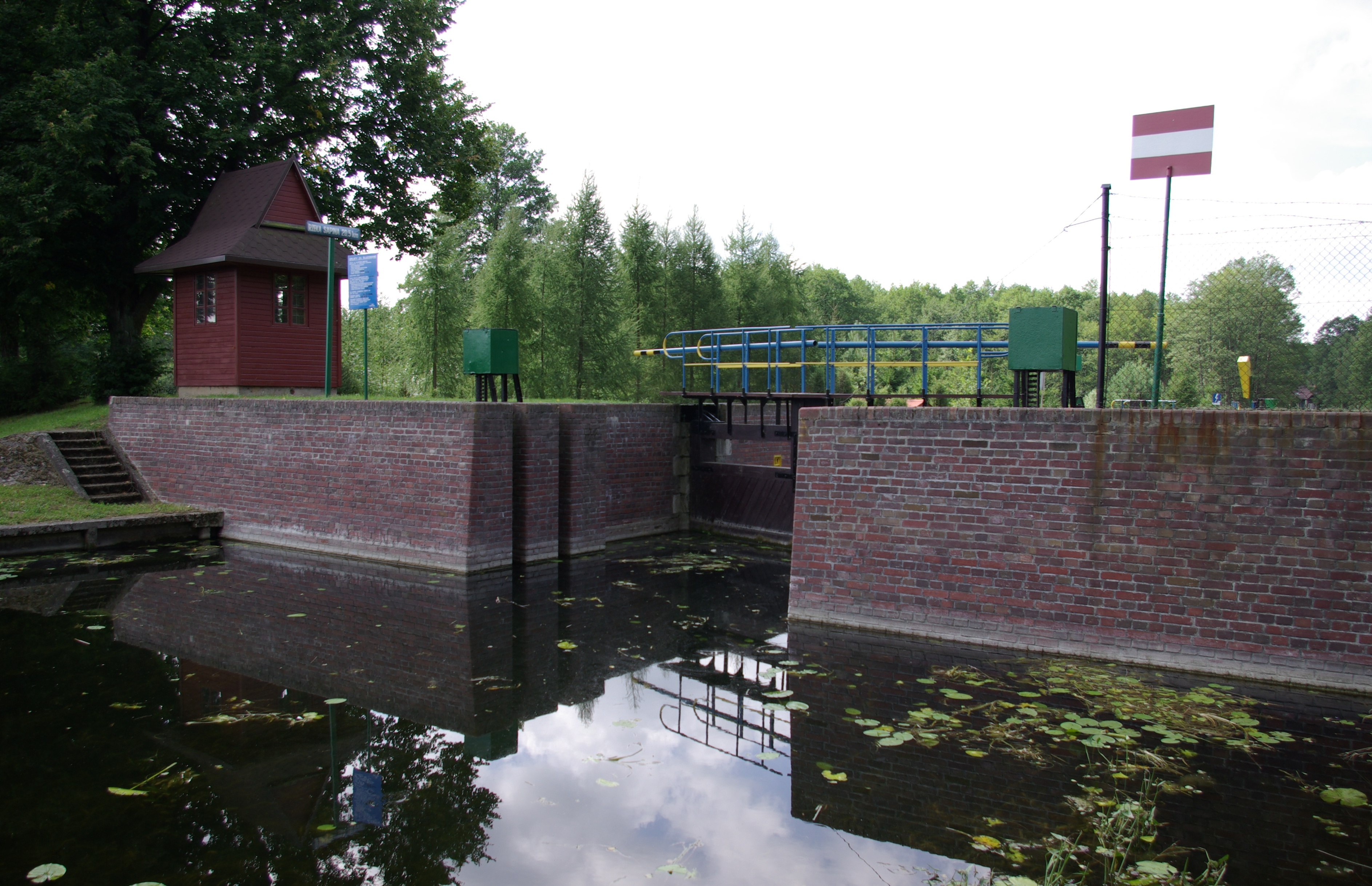 Sapina, Śluza Przerwanki